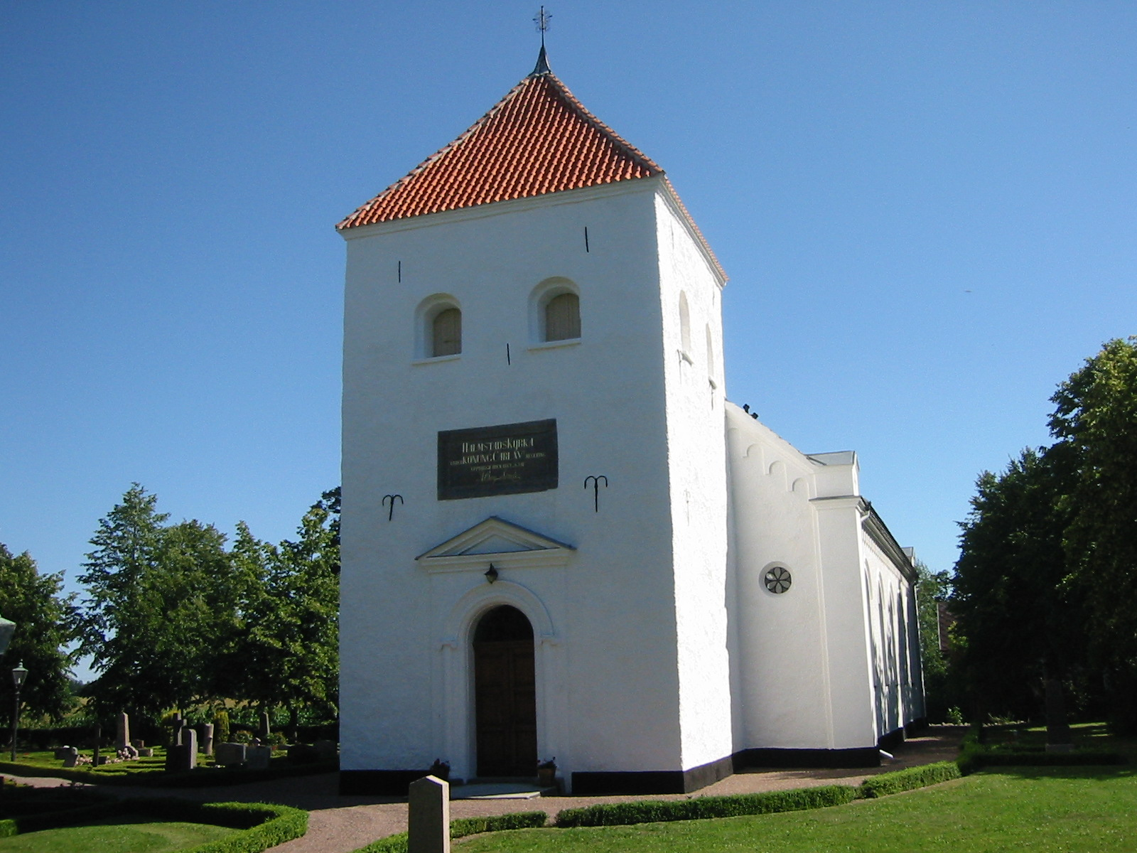 Halmstads kyrka (Skåne).